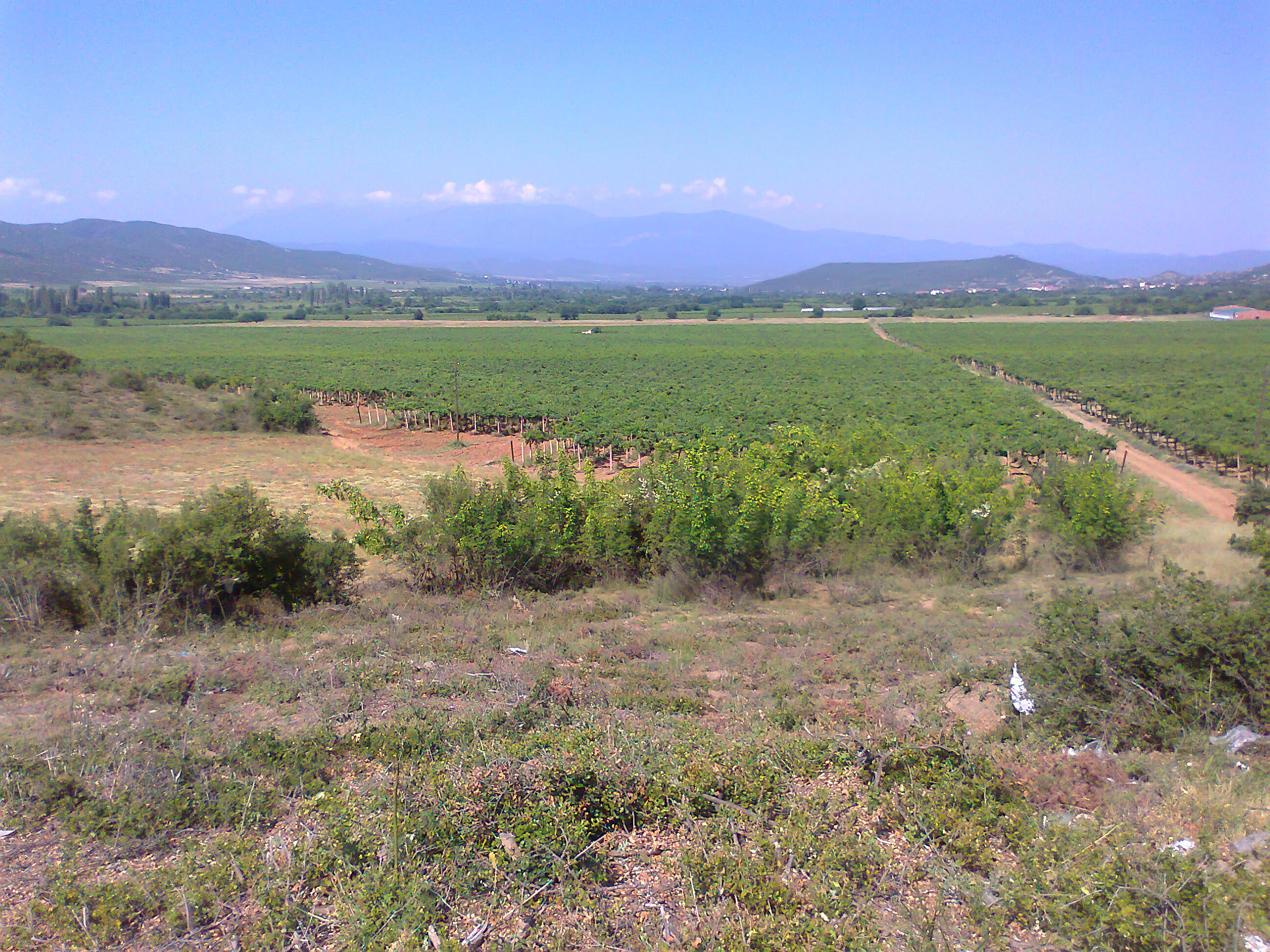 Rabrovo, Macedonia